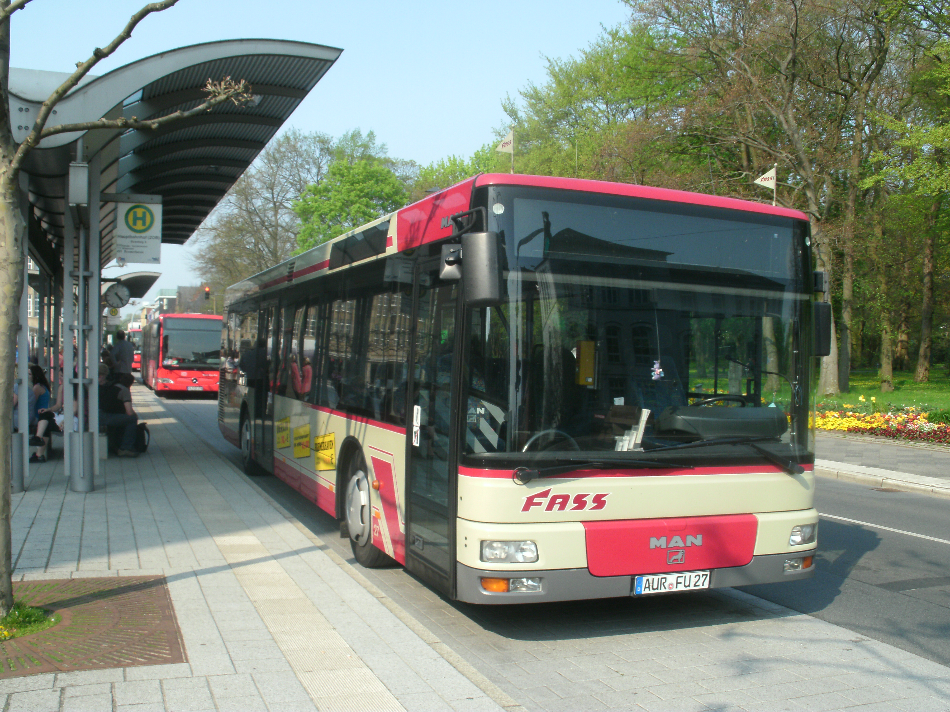 Niederflurbus von Fass Reisen am ZOB Wilhelmshaven (vor dem Bahnhof)